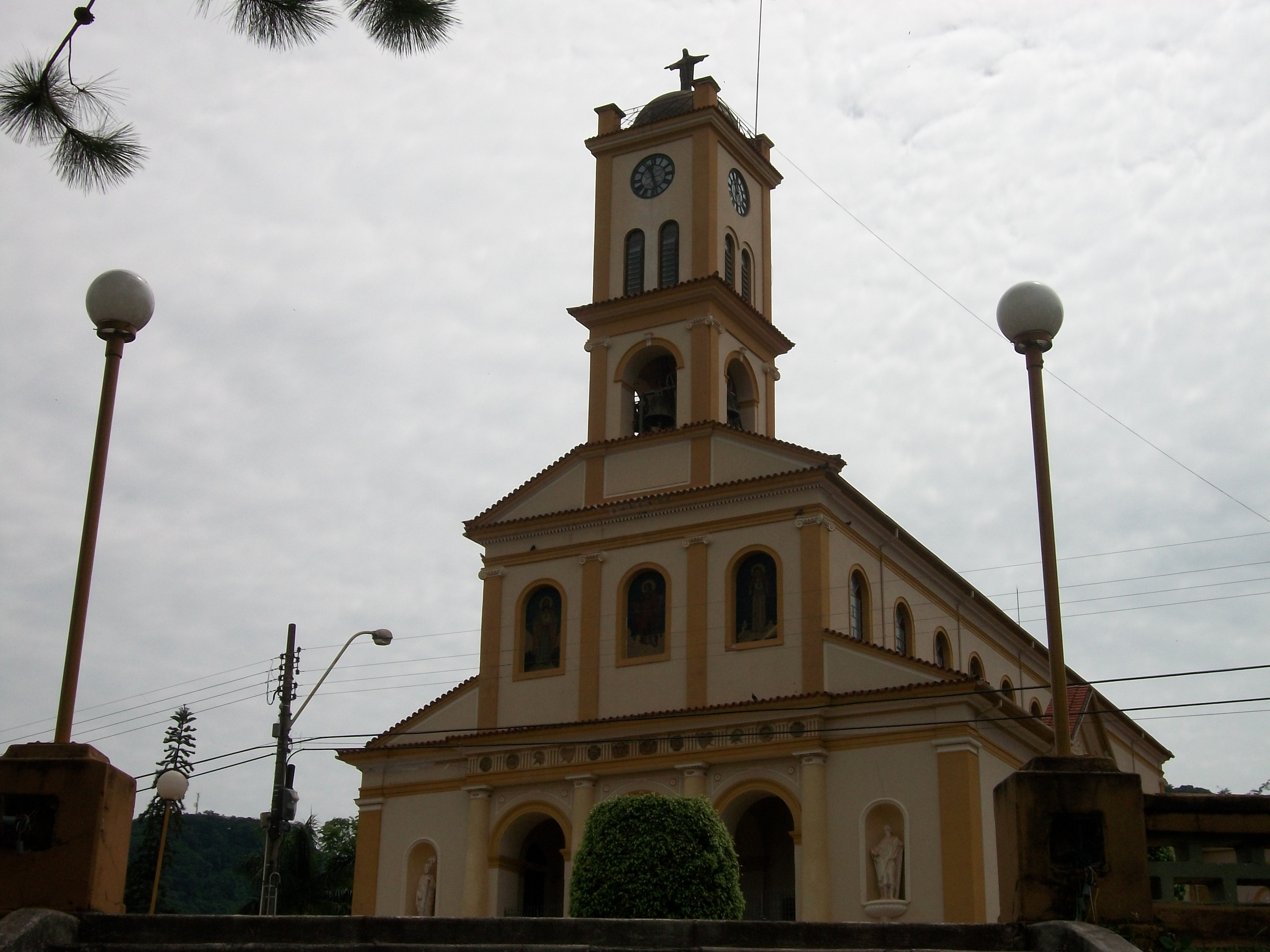 Pfarrei von São Simão-SP, Brasilien; 20. Februar 2010